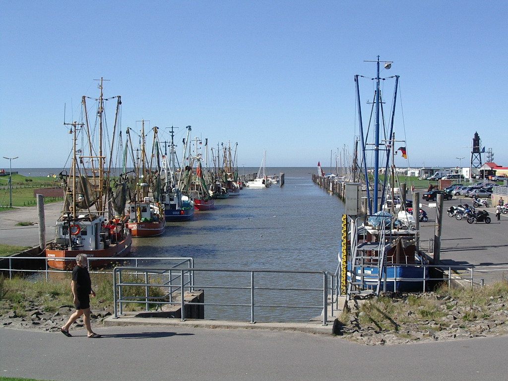 Dorumer Siel, Fischerhafen mit Krabbenkuttern Foto von Benutzer:Geoz 2005